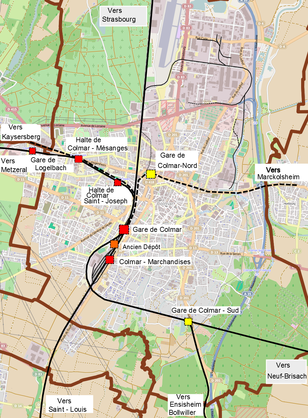 Plan du système ferroviaire de Colmar. En rouge: gares ouvertes. En jaune: gares fermées. Trait épais: lignes principales. Trait fin: voies de services et embranchements. Pointillés: voies déposées.